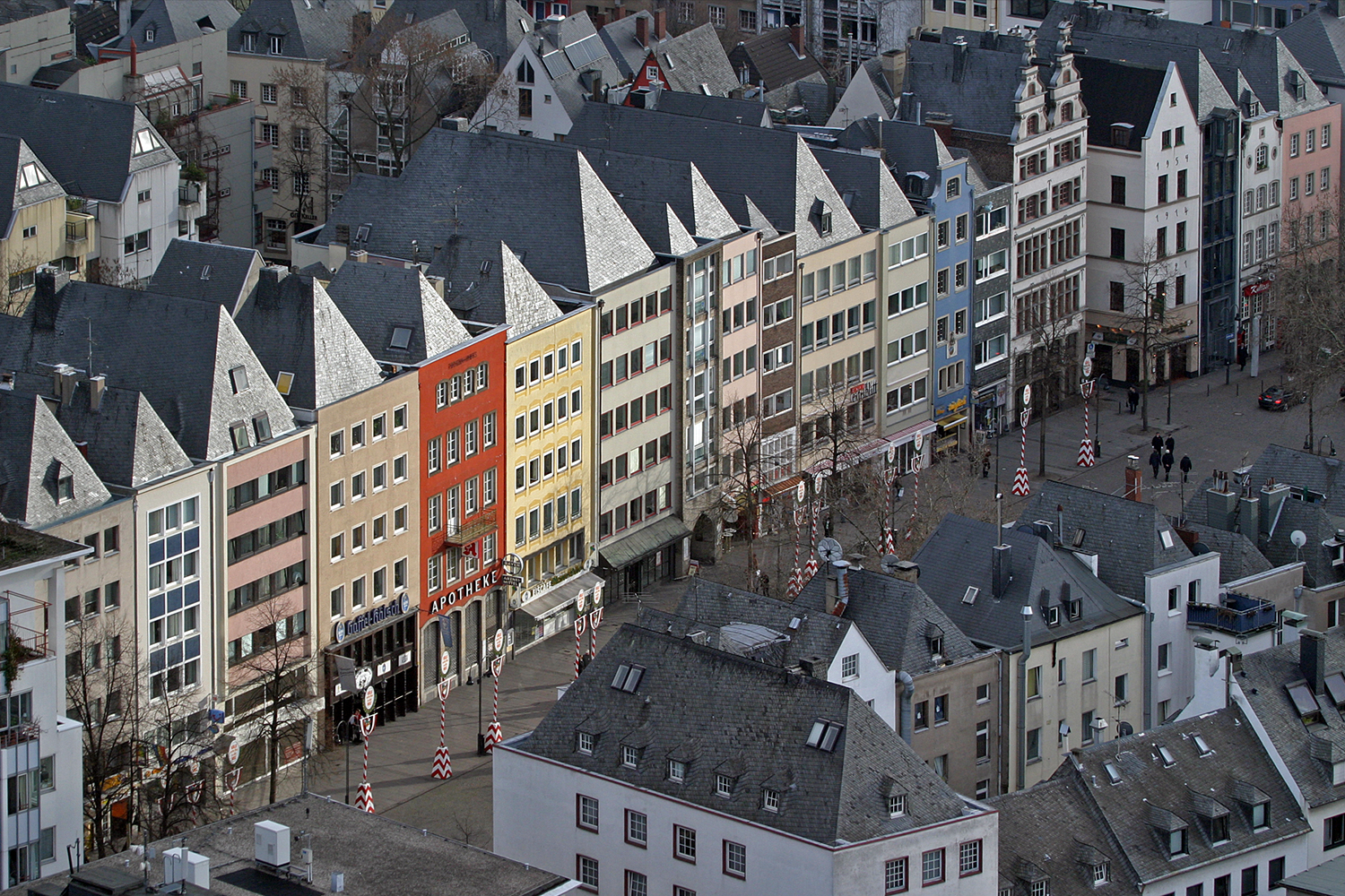 Alter Markt in der Kölner Altstadt, aufgenommen vom Turm des Kölner Domes